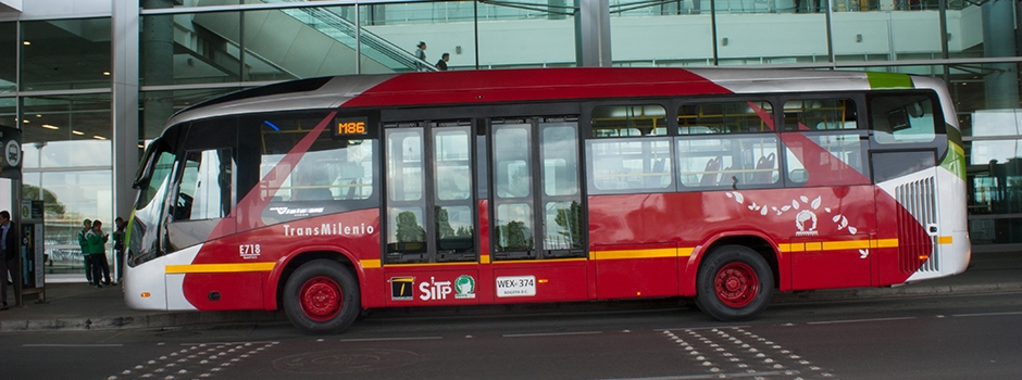 bus dual manejando la ruta M86 en el aeropuerto